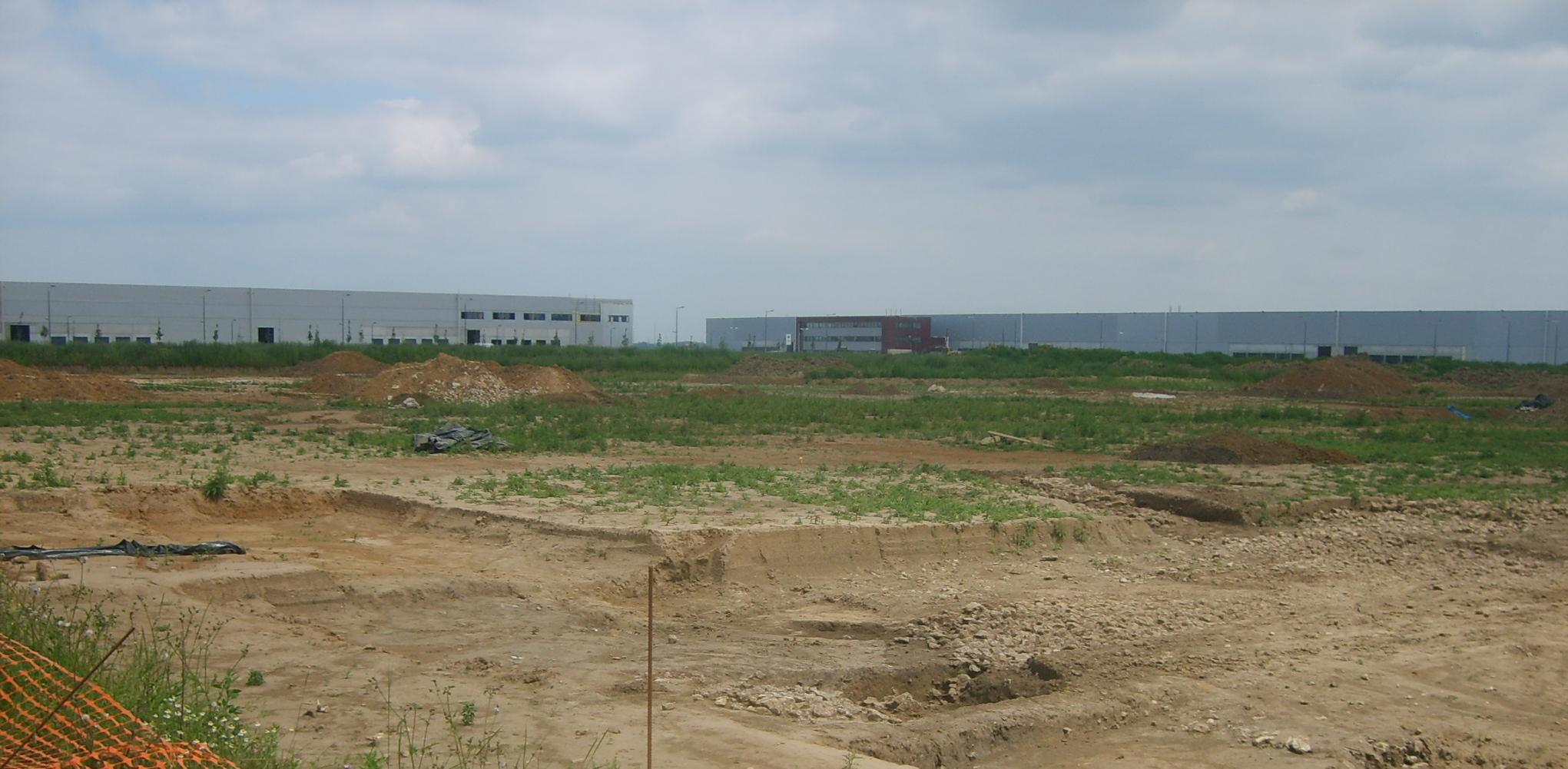 Nouvelle Zone industrielle